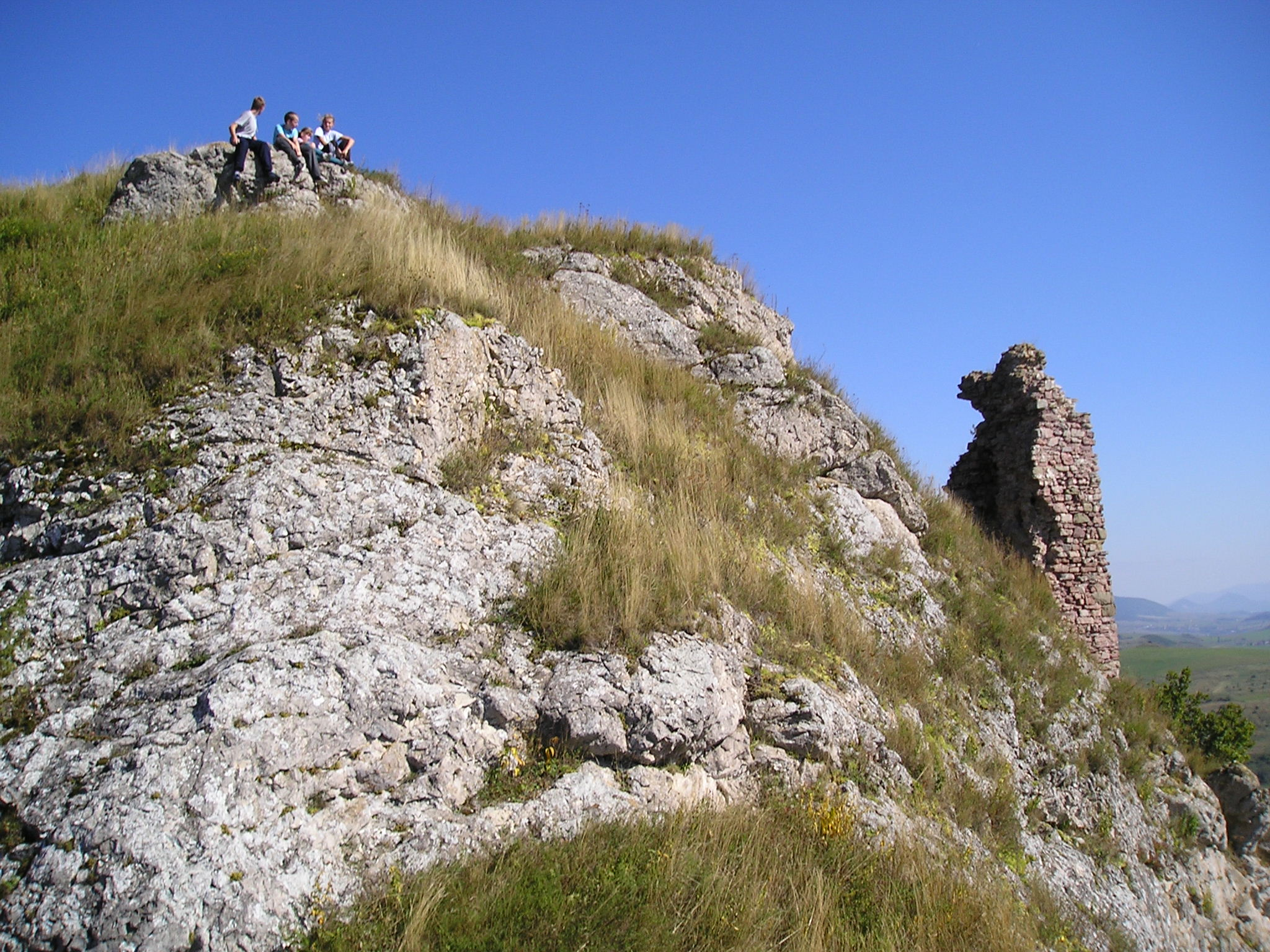 Kategória:Presunúť_na_Commons